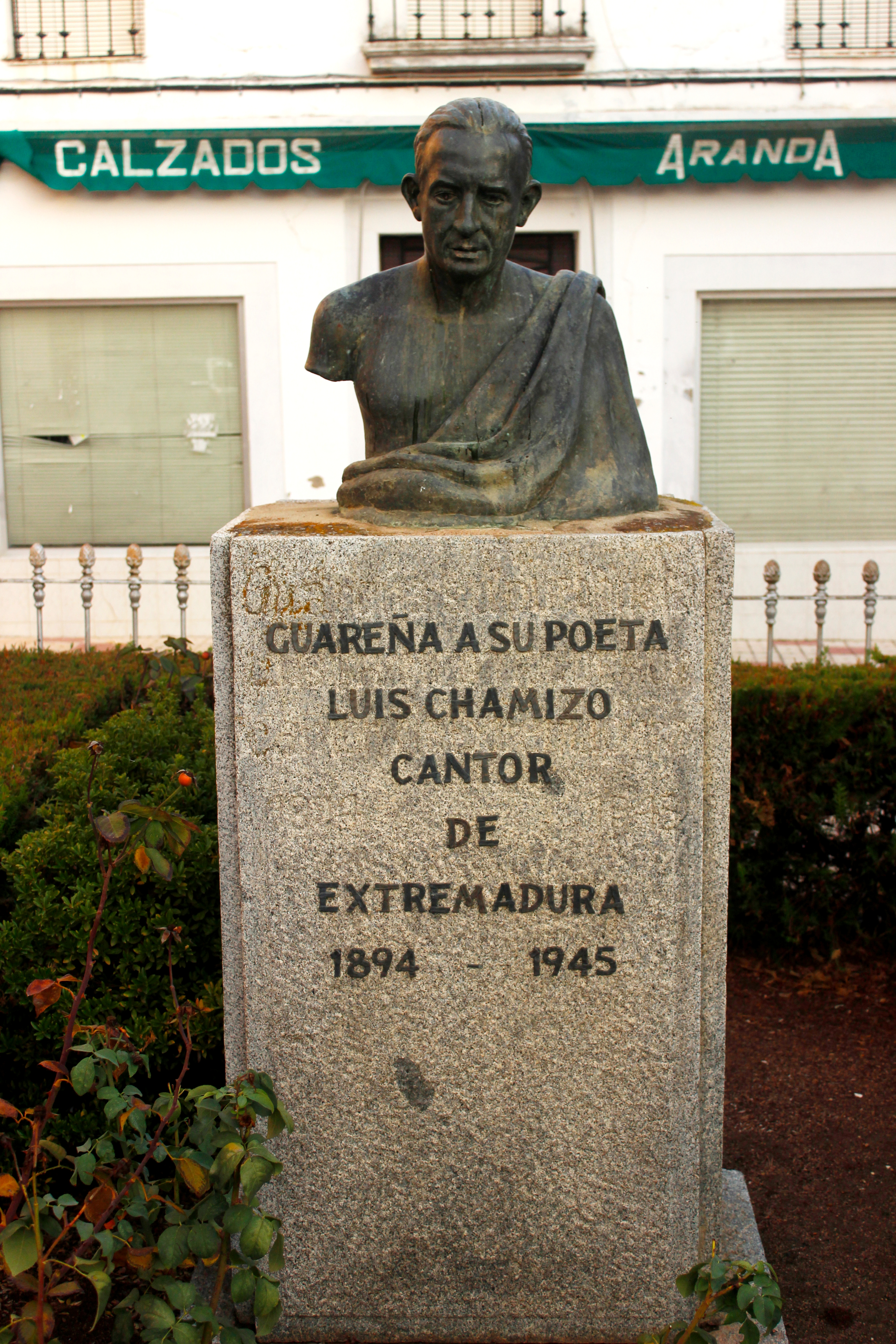 Busto de bronce en homenaje a Luis Chamizo, escritor extremeño, en Guareña, su localidad natal.